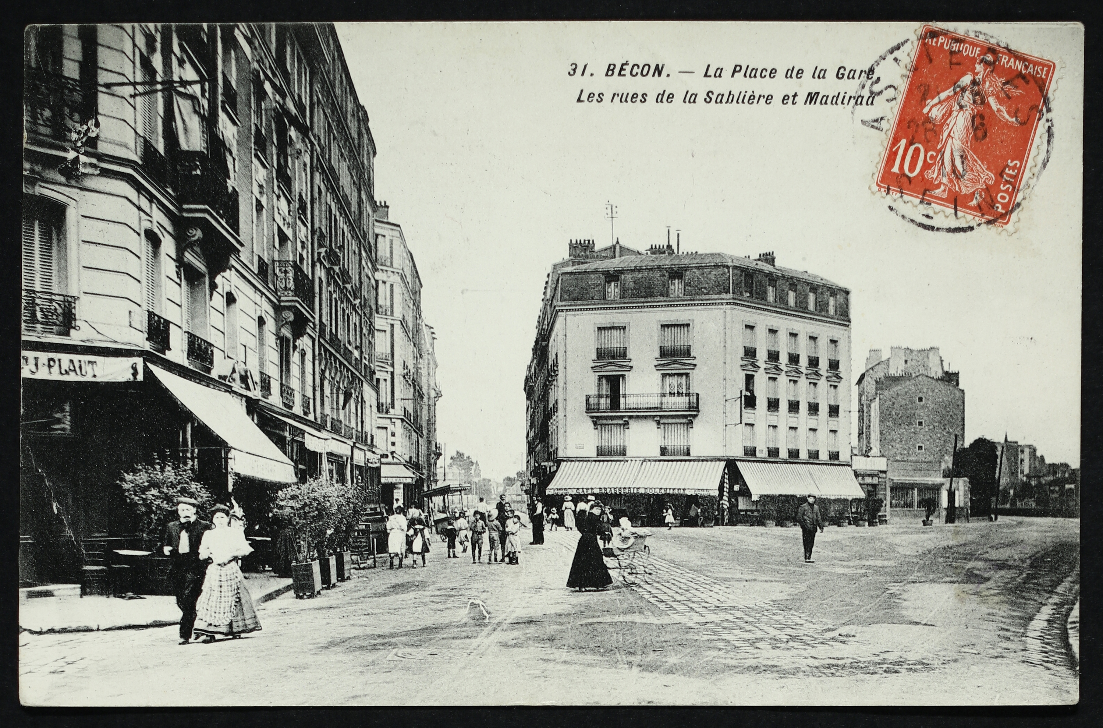 Bécon- La Place de la Gare - Les rues de la Sablière et Madira - 9FI/COU_54